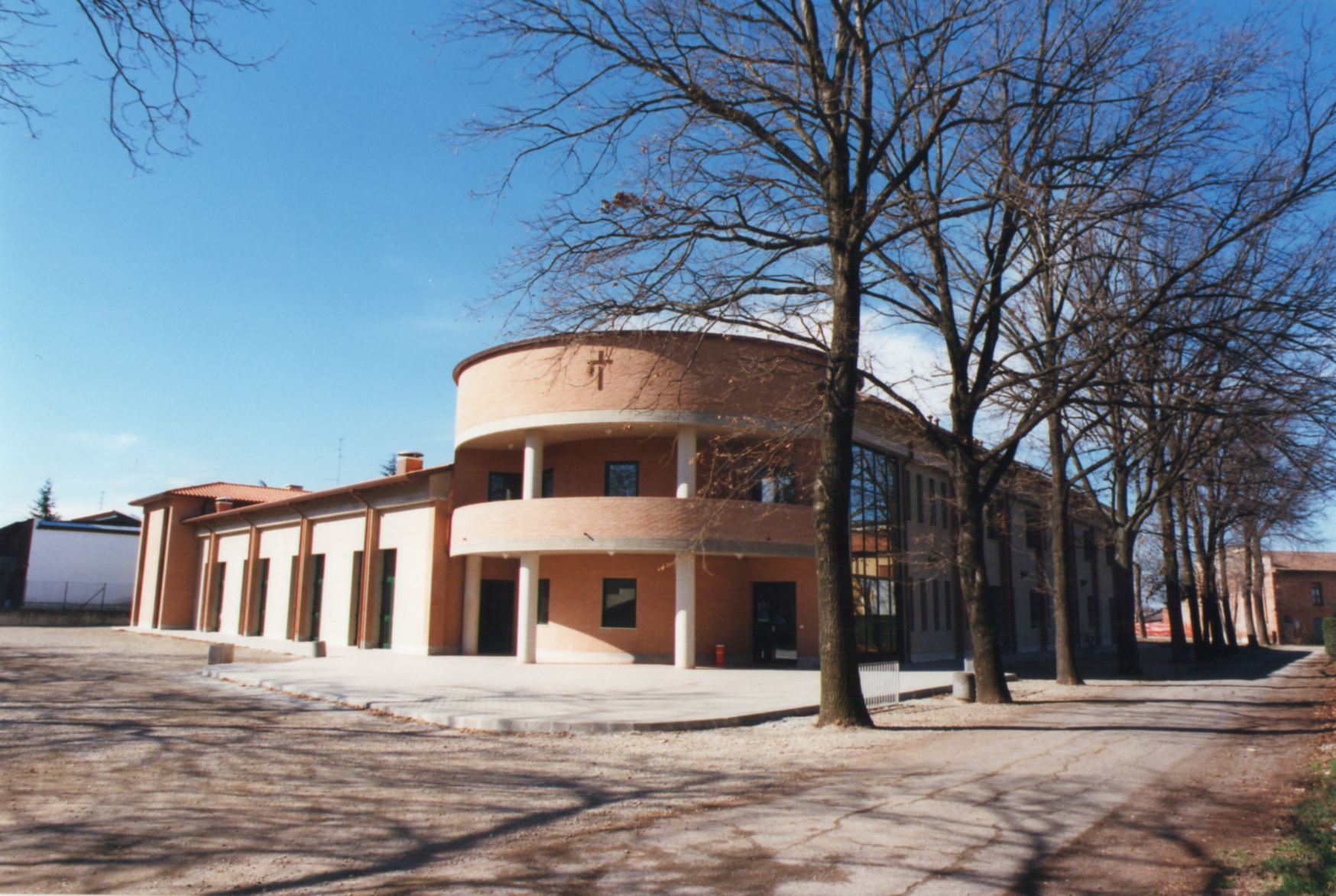 Oratorio Parrocchiale voluto dalla comunita' parrocchiale e dall'allora parroco don Franco Gallingani